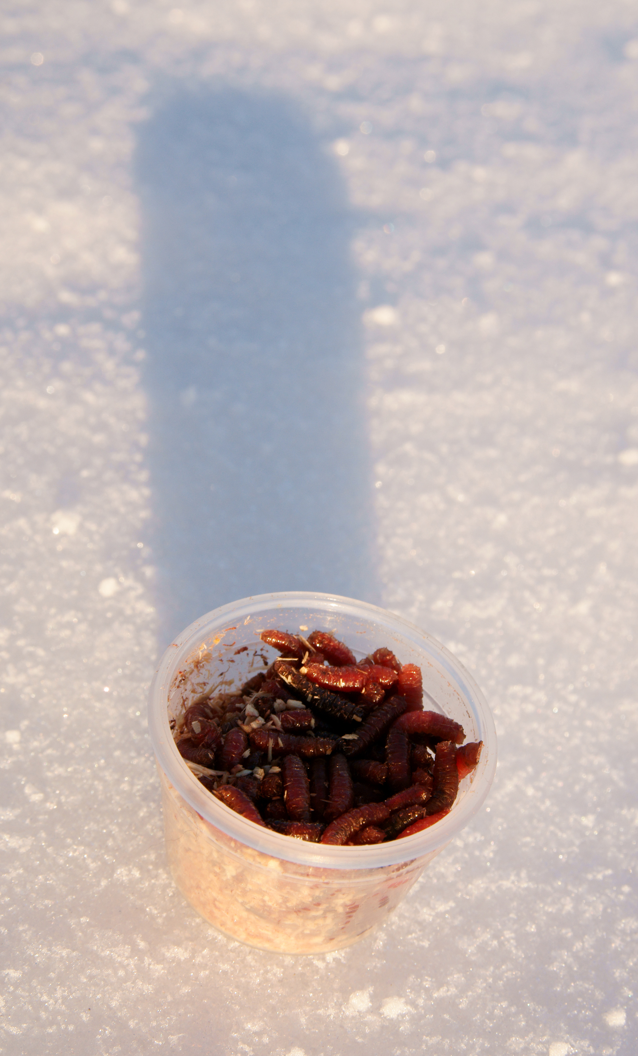 Pilkkitoukkia.